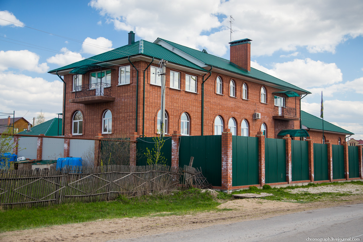 Новостройки на ул. Советской, Старая Бинарадка, Самарская область, Россия